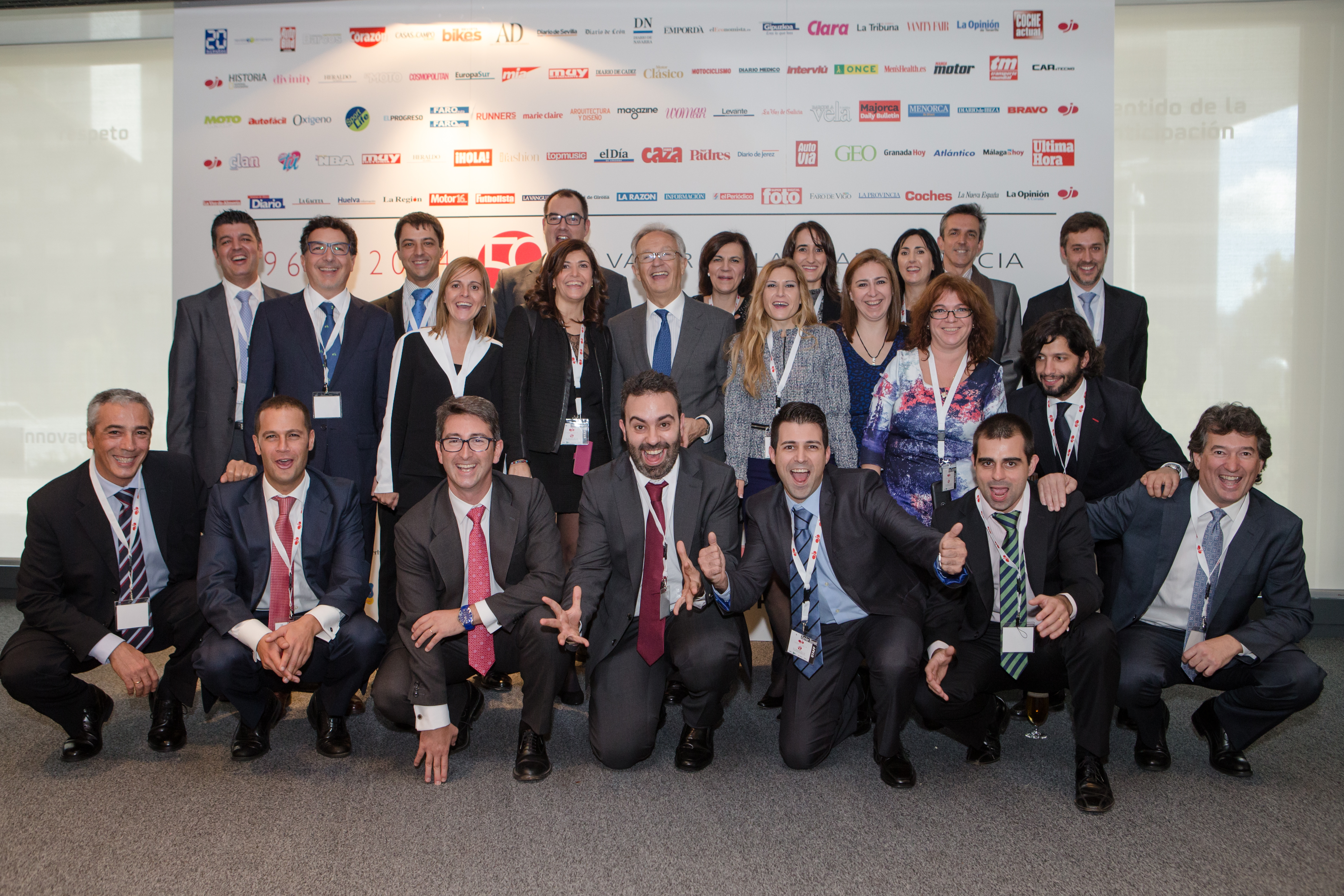 Staff de Introl durante la celebración del 50 Aniversario de OJD/Introl